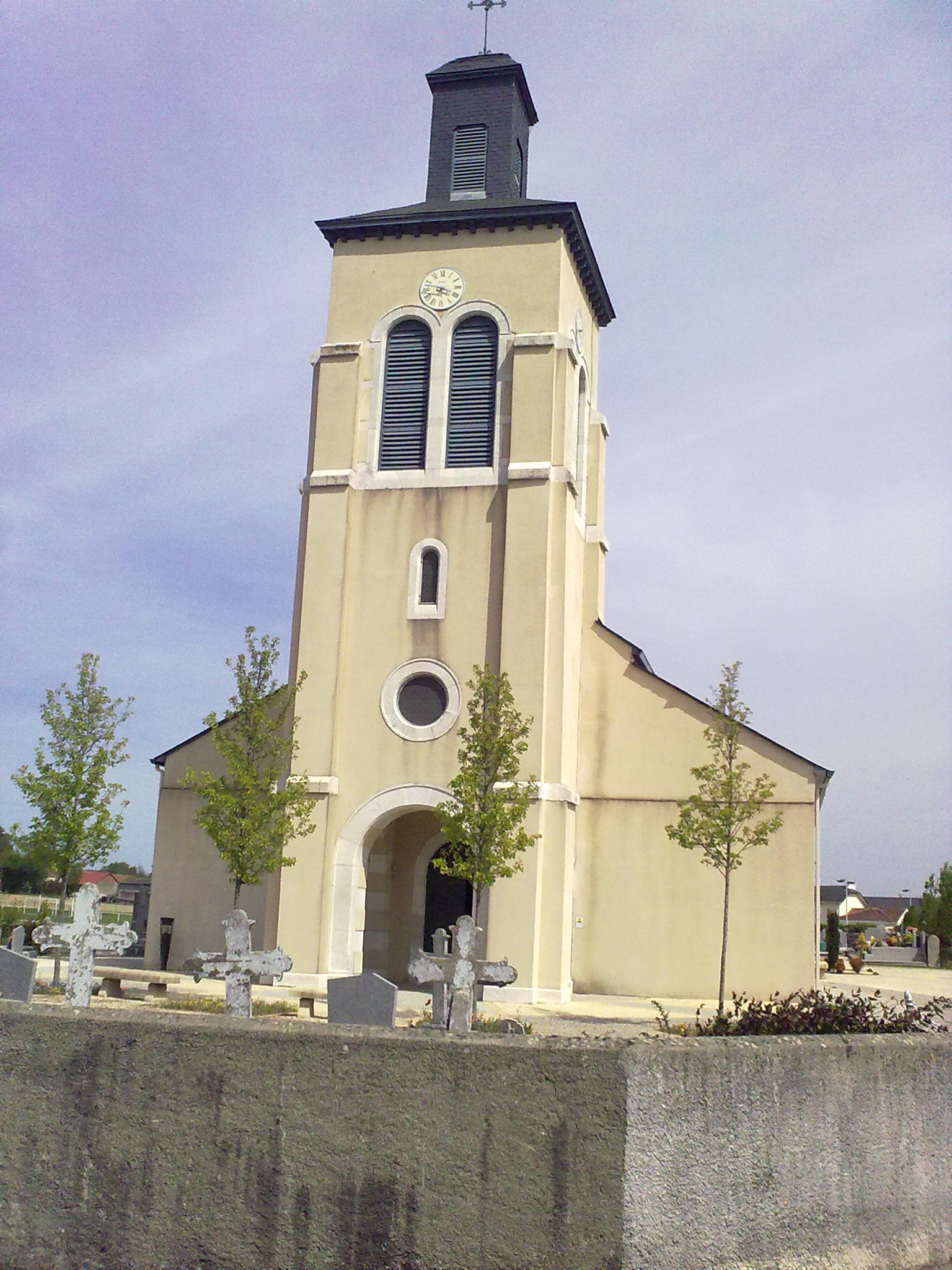 Uzein France Europe